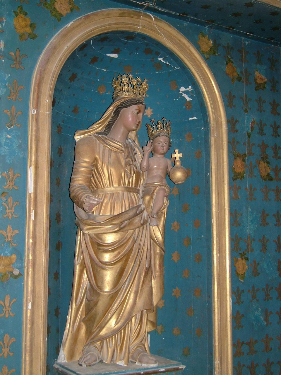 Samonac, Gironde (France); statue de la Vierge à l'Enfant (XIXème siècle) placée au dessus de l'autel du bas-côté sud.